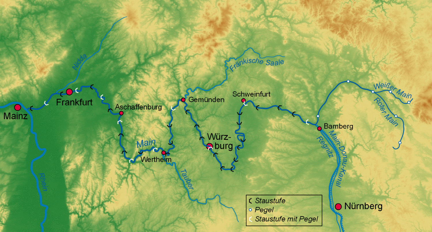 Verlaufskarte des Main